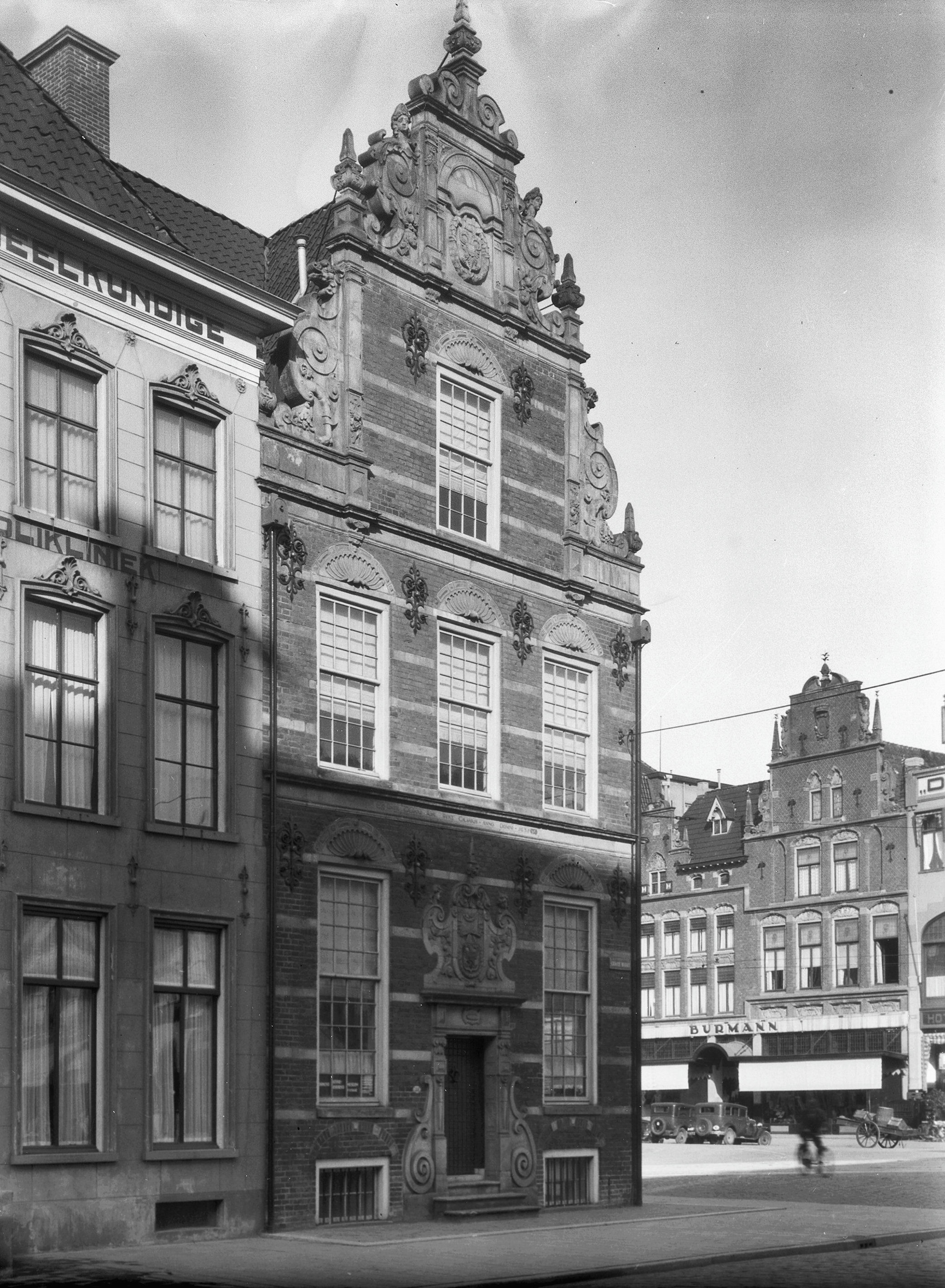 Goudkantoor: voorgevel